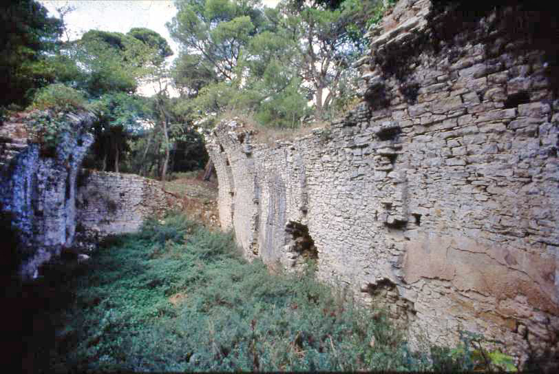 Interno della Funtanazza, sul Monte Bonifato